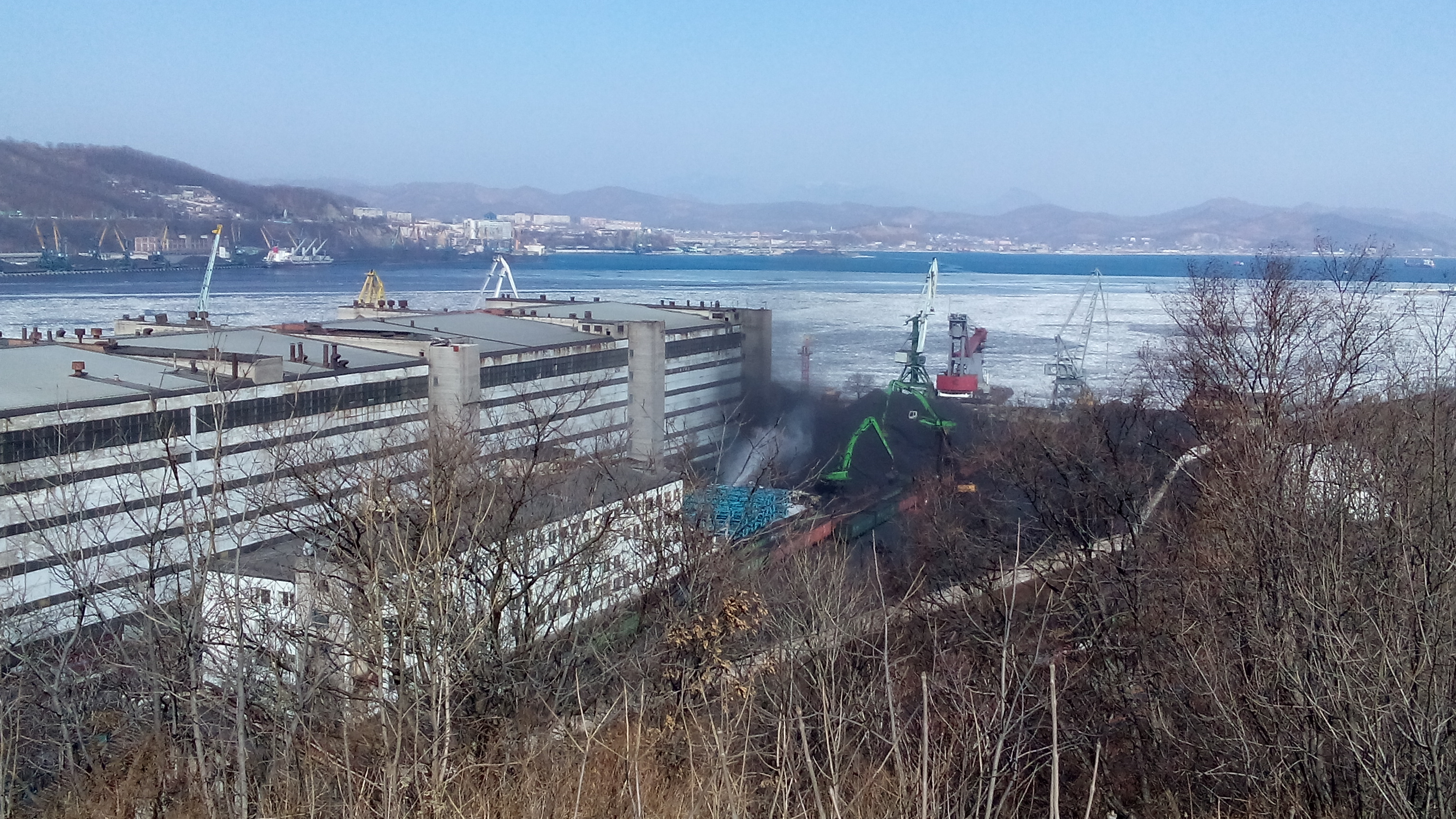 Облако угольной пыли при перегрузке угля компанией «Терминал Астафьева» в Находке